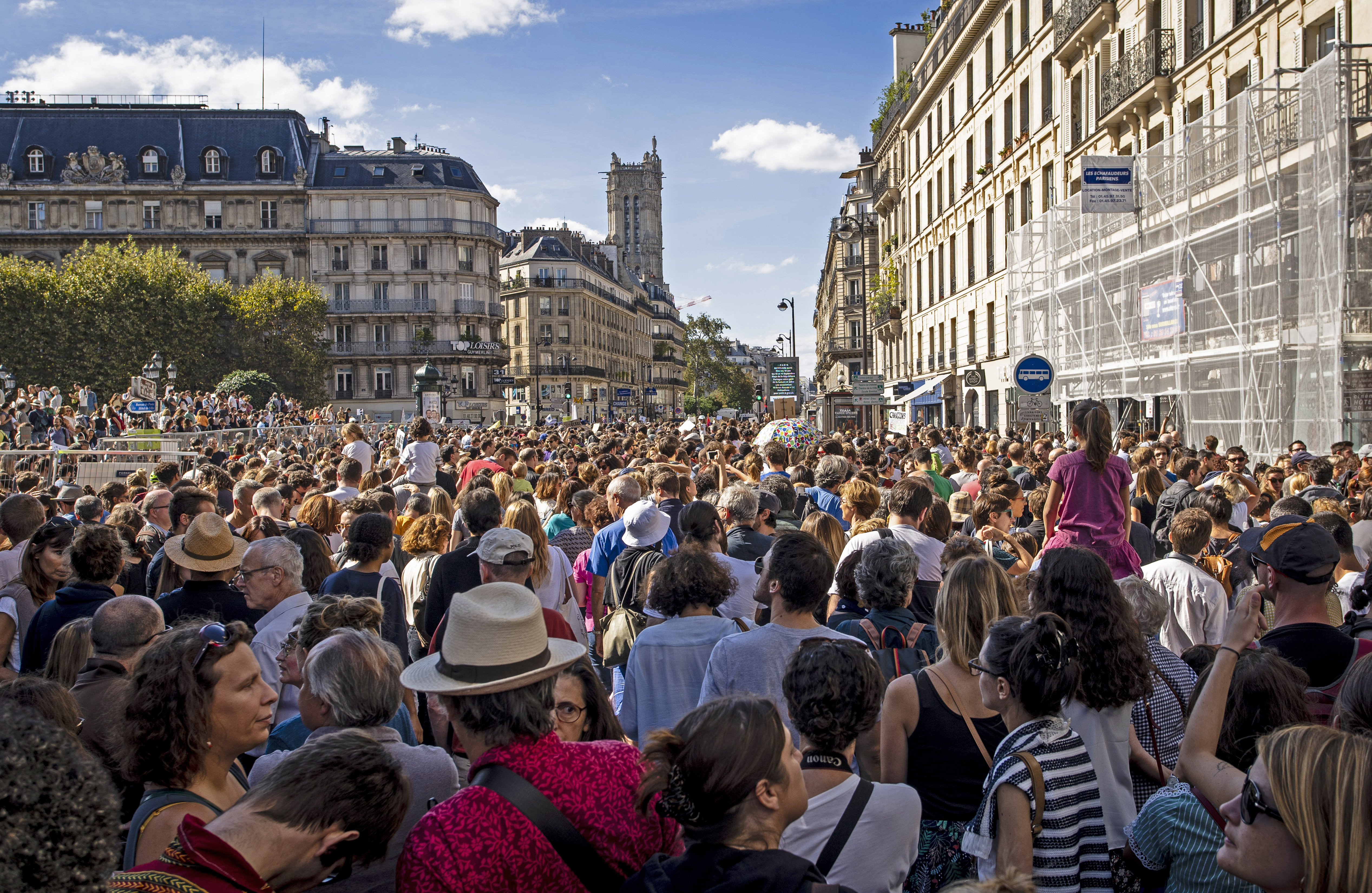 Première « Marche pour le climat ». À Paris, la place de l'Hôtel de ville est saturée de manifestants qui sont immobilisés jusque dans la rue de Rivoli, également saturée.